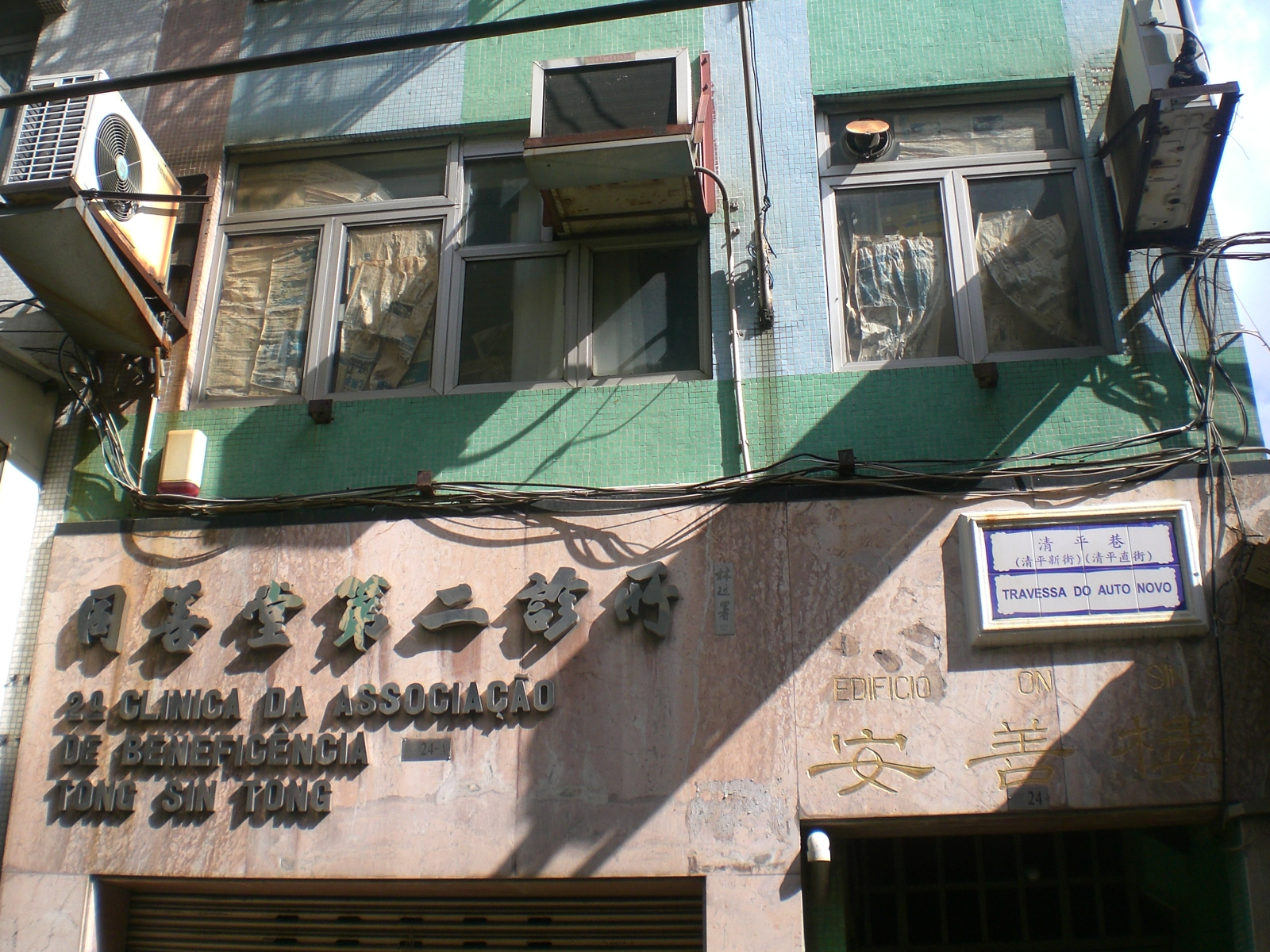 澳門同善堂, 澳門西灣